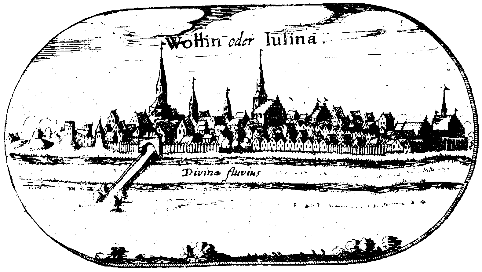 Rycina miasta Wolin z mapy Lubinusa - Mapa księstwa pomorskiego z 1618 roku.